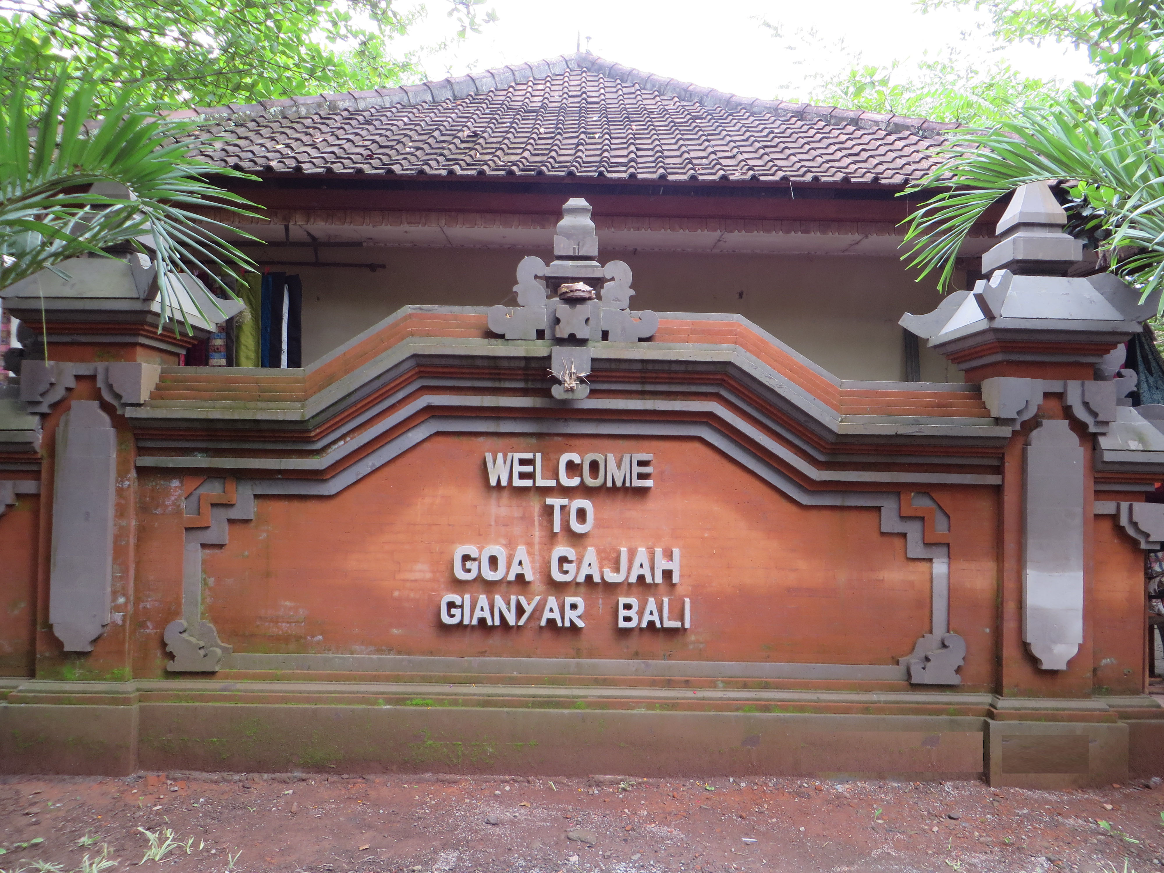 Gerbang Masuk Area Goa Gajah